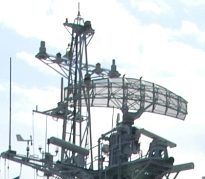 中国人民解放軍海軍の江衛型フリゲート「三明」搭載の360型レーダー。